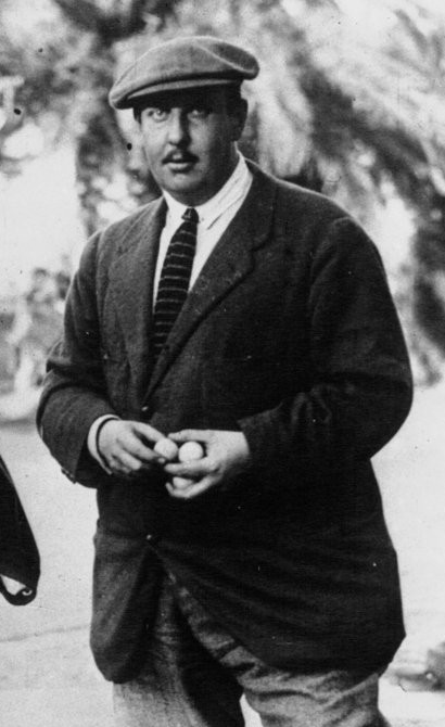 Nicolas Wladimirovitch Orloff